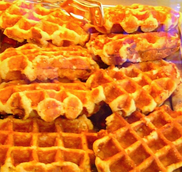 Lütticher Waffeln